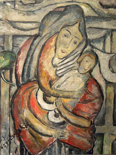 Madonna